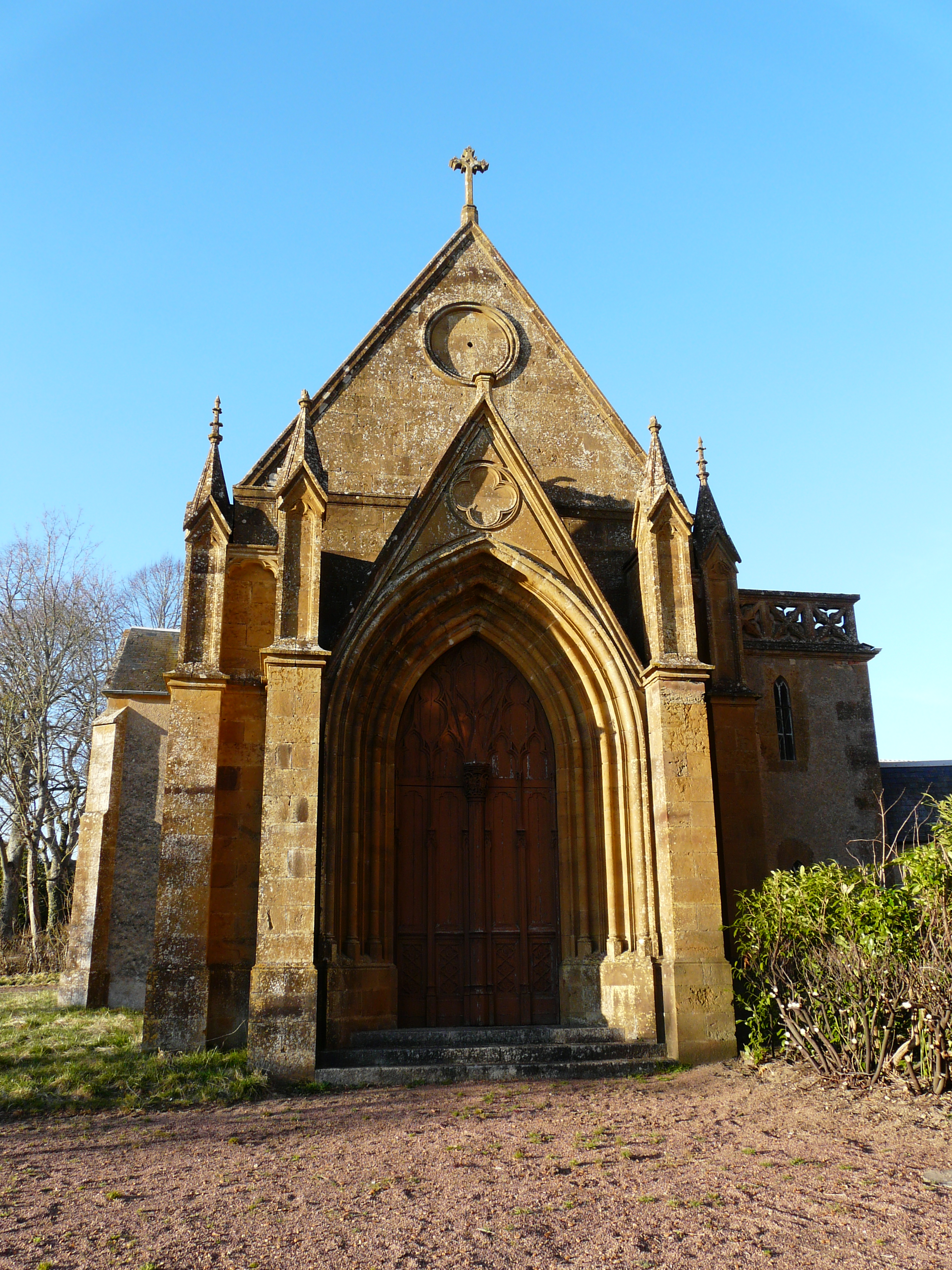 Chapelle de Villemolin, édifiée en 1830, ISMH 1978